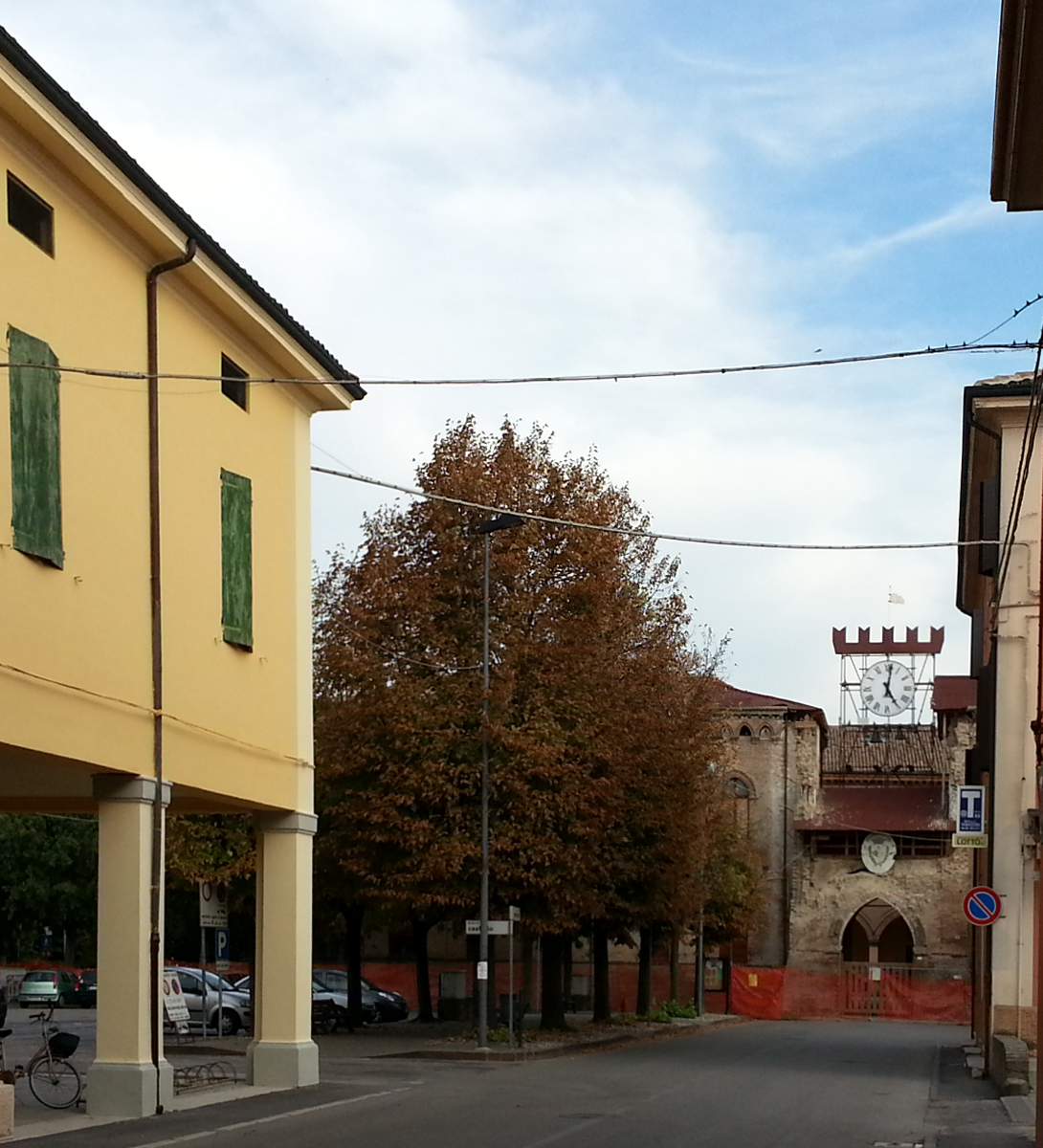 Poggio Renatico: la torre dell'orologio dopo il ripristino dell'orologio (2012)